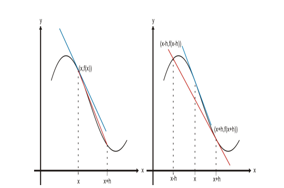 derivadas